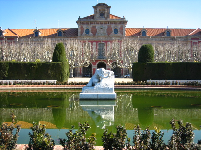 Vista exterior del Parlament de Catalunya.